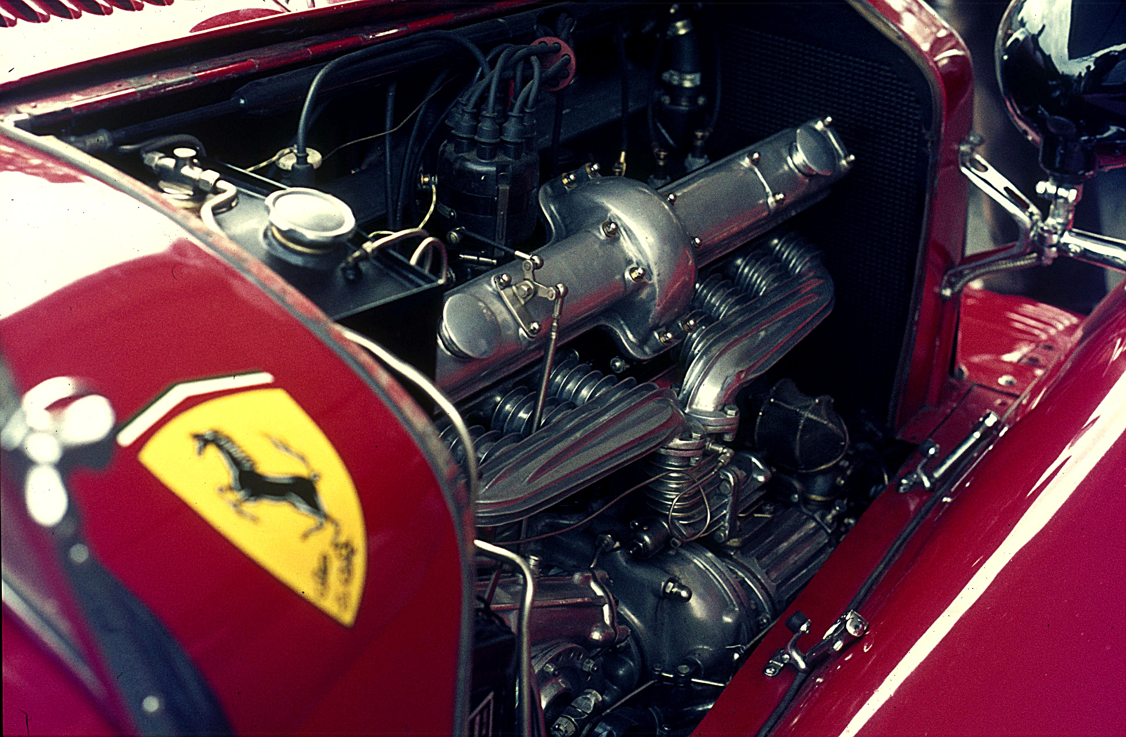 Alfa Romeo 8C 2300, Baujahr 1932, Motor und Kompressor